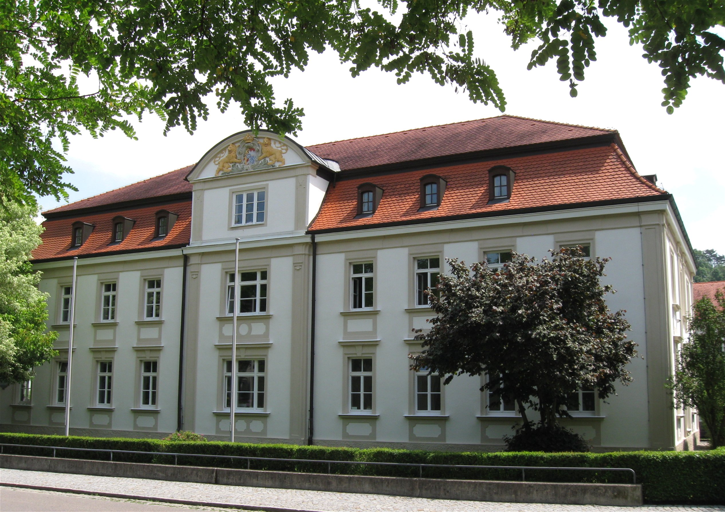 Lechstraße 7; Amtsgericht und ehemaliges staatliches Gefängnis, westlicher zweigeschossiger Mansardwalmdachbau mit neubarocker Fassadengliederung durch nördlichen eingeschossigen Satteldachbau mit östlichem zweigeschossigen Walmdachbau U-förmig um einen Hof verbunden, nach Plänen von Karl Voit und Sigmund von Schab, 1898/99, Umgestaltung 1957. D-1-81-130-236